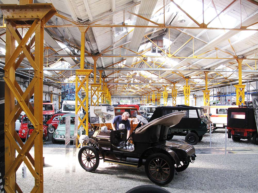 Die Puch Voiturette von 1906 in der letzten authentischen halle des "Einser-Werkes" von Johann Puch, heute das "Johann Puch-Museum Graz". Bei der Voiturette steht Franz Tantscher, vormals Werksmechaniker des mehrfachen Moto Cross-Weltmeisters Harry Everts.